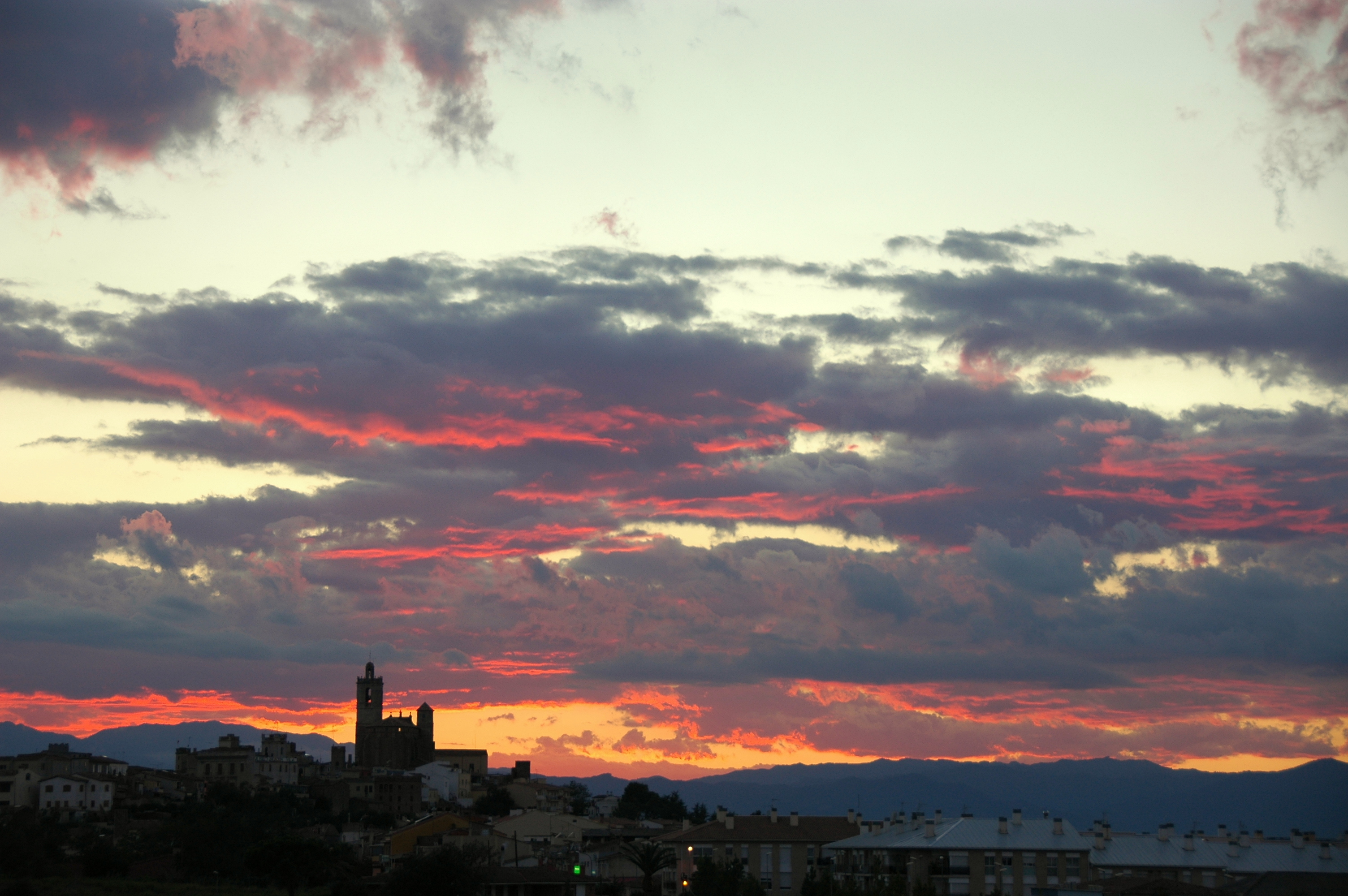 El poble de Llagostera sota el cel rogent.